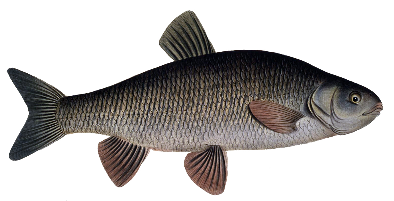 Leuciscus idus